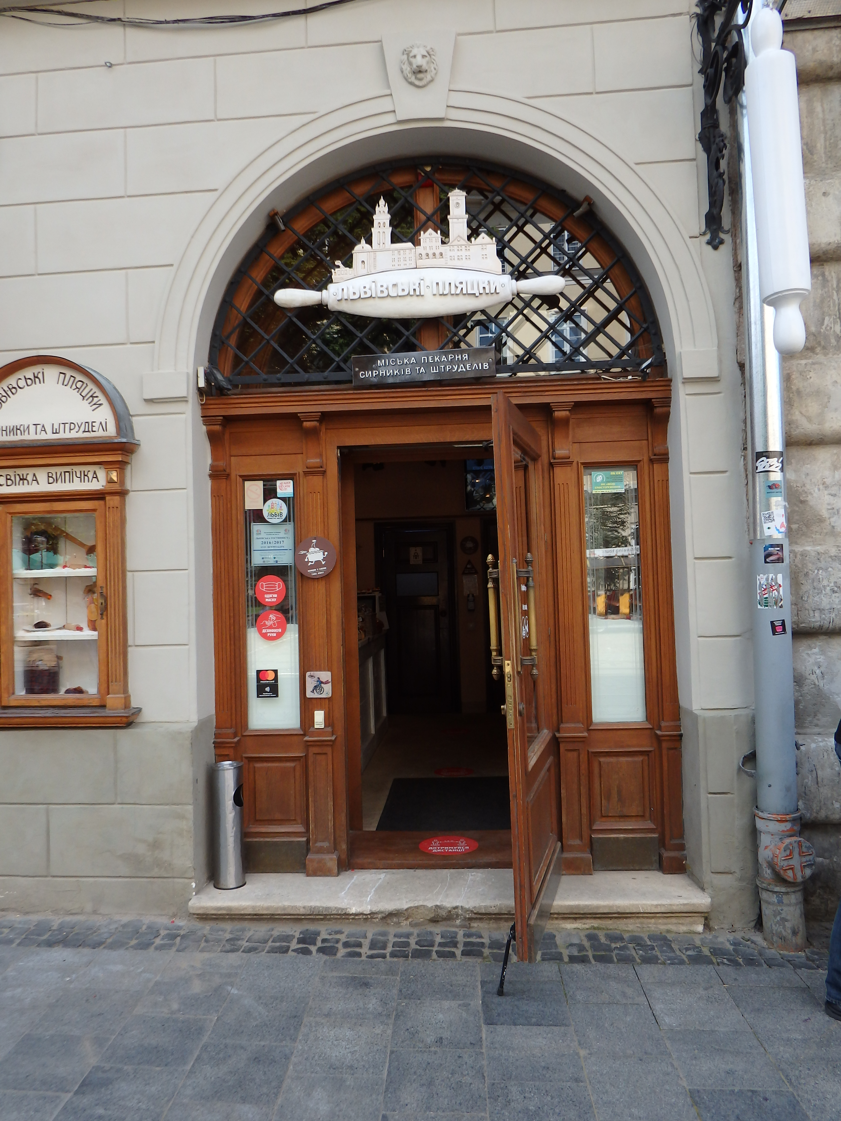 Львівські пляцки - пекарня сирників та штруделів.